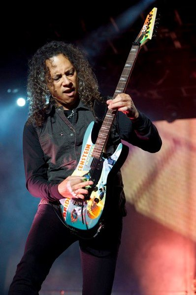 Kirk Hammett durante concierto en guadalajara Mexico